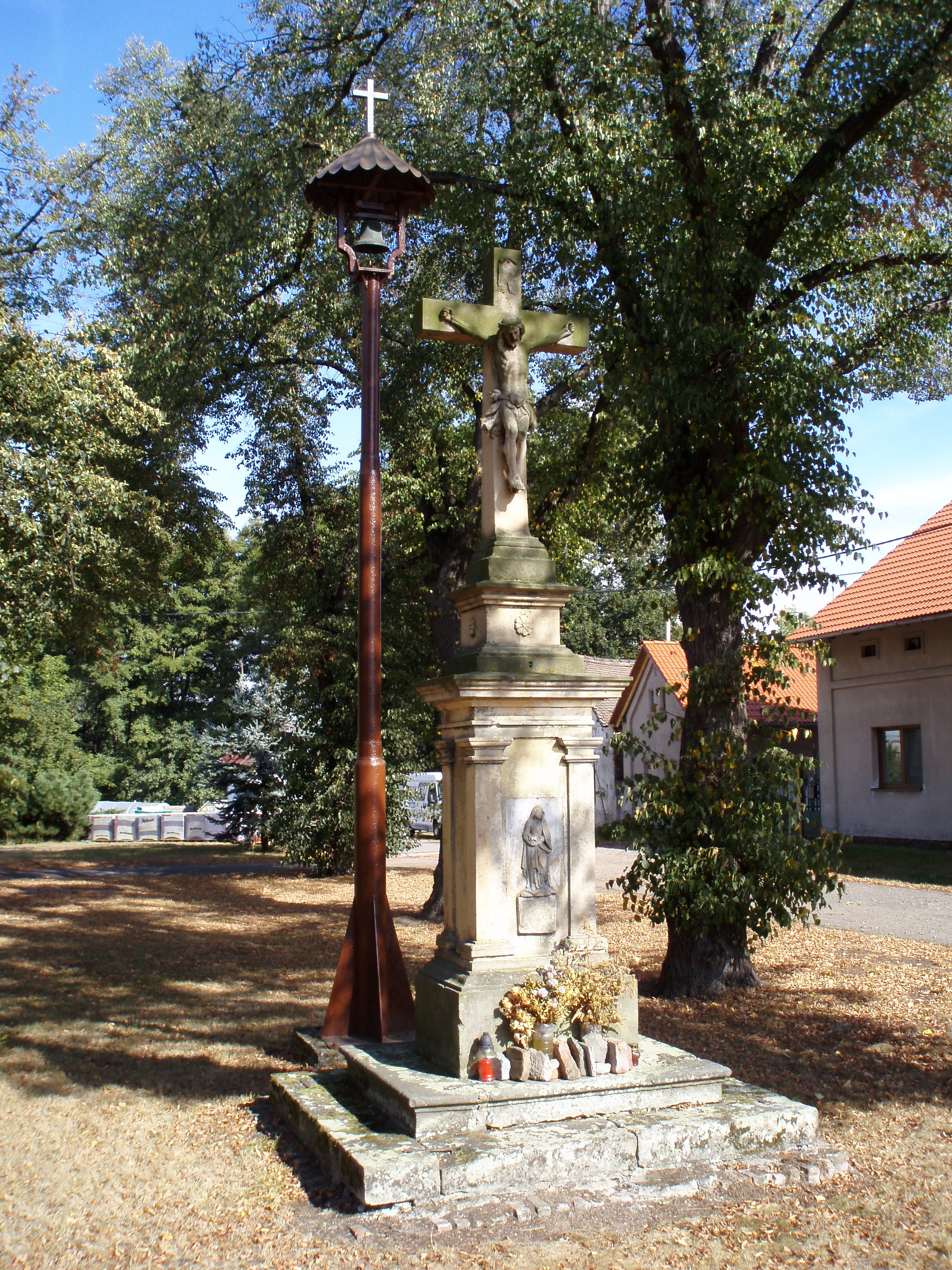 Zvonička s křížem na Grégrově náměstí v Březhradě